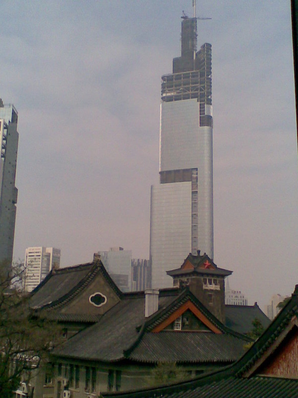 两代辉煌，交相辉映